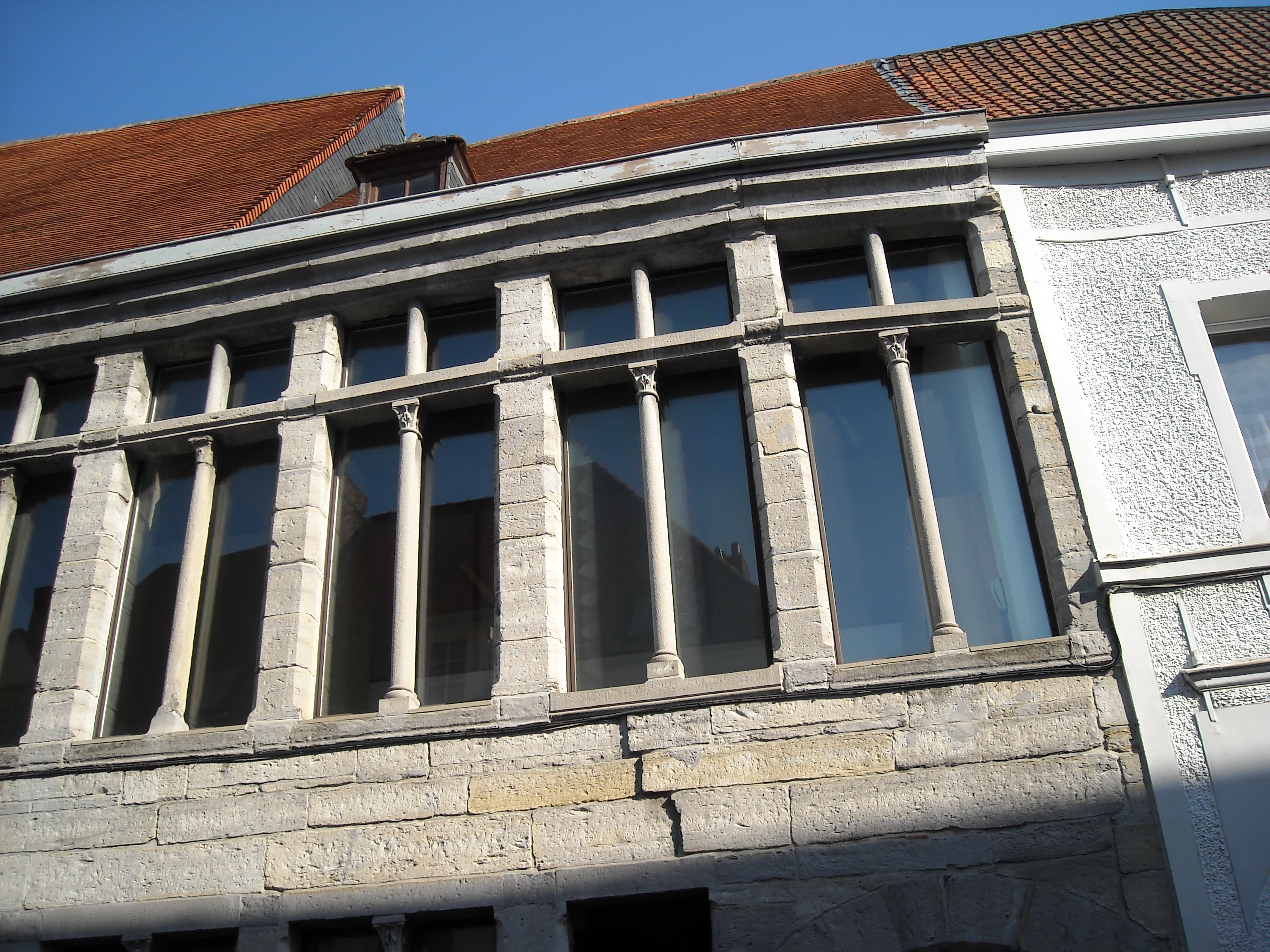 Façade (étage)